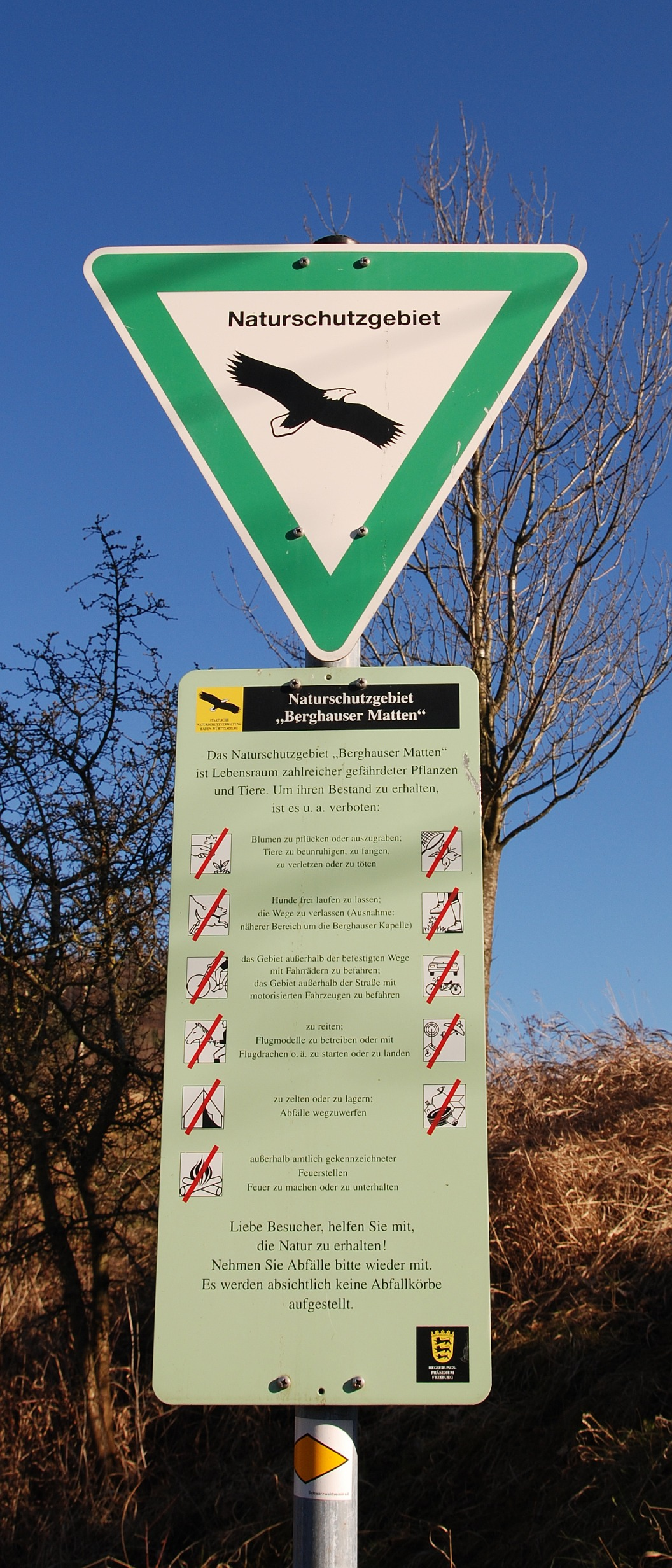 Hinweisschild auf ein Naturschutzgebiet, hier: „Berghauser Matten“ im Landkreis Breisgau-Hochschwarzwald.